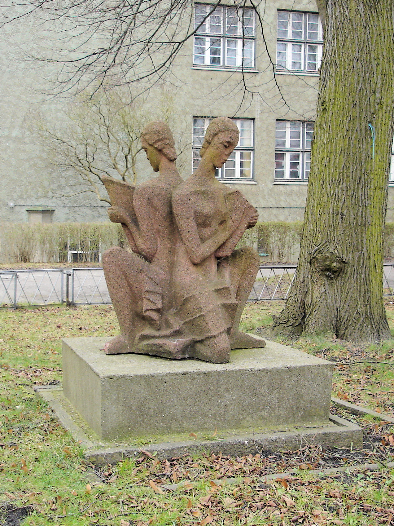 Kunststeinplastik "Erholung" Parkstraße Rostock